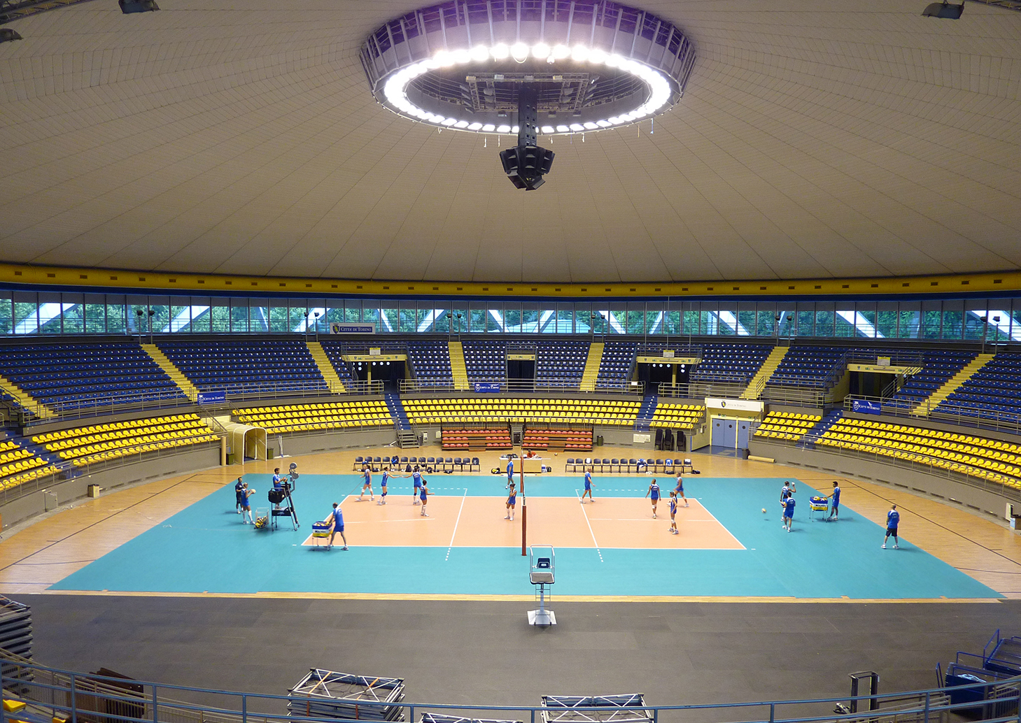 PalaRuffini di Torino: vista panoramica